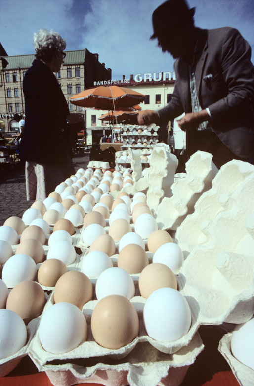 Försäljning av frukt och grönt på Kungstorget. Motiv: Stora Saluhallen Kategori: Saluhall, Torgmiljö Försäljning av frukt och grönt på Kungstorget. Stora Saluhallen.